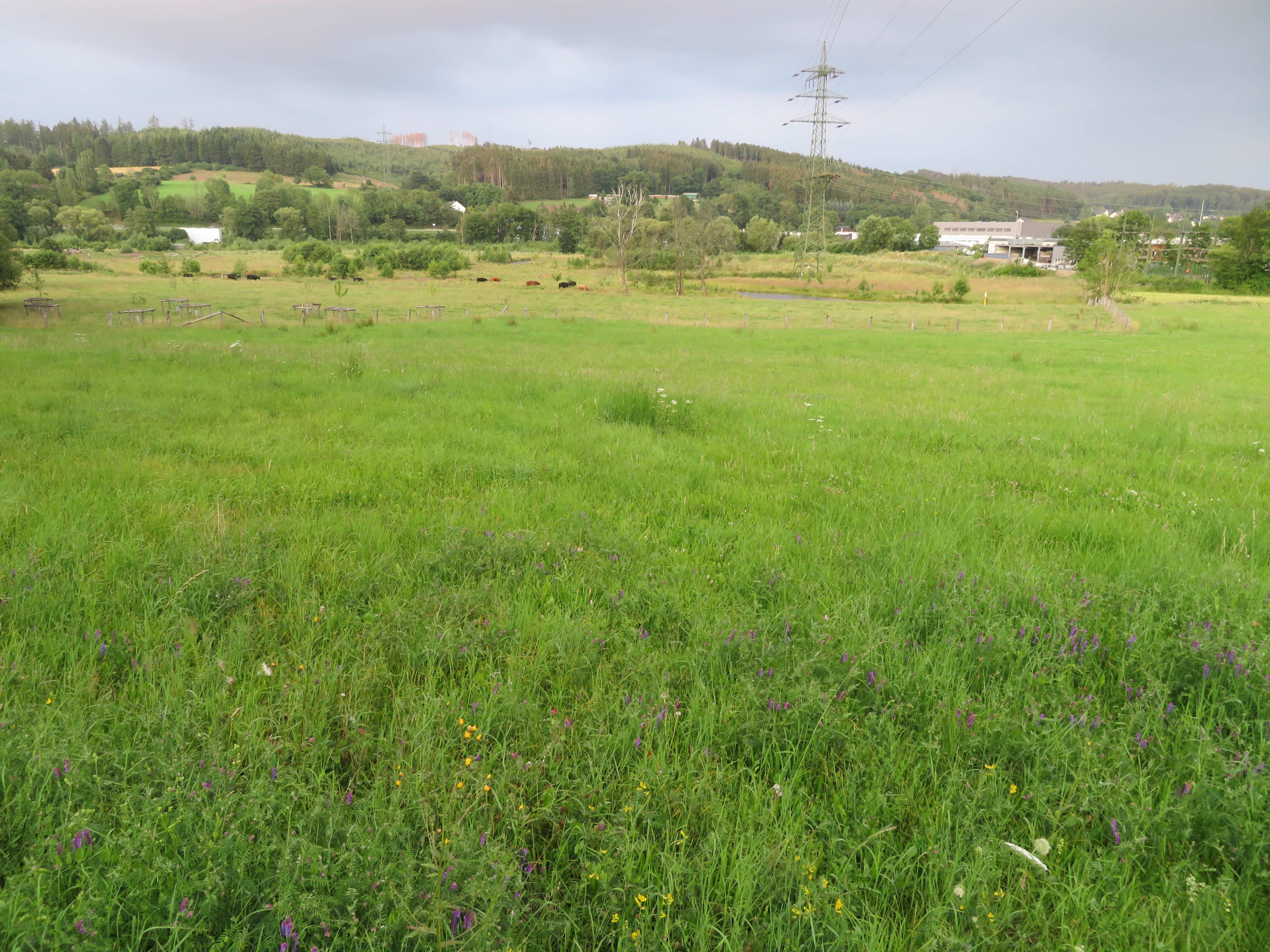 Landschaftsschutzgebiet Sorpewiesen Lange Erlen​ (nur Offenland) von Westen.